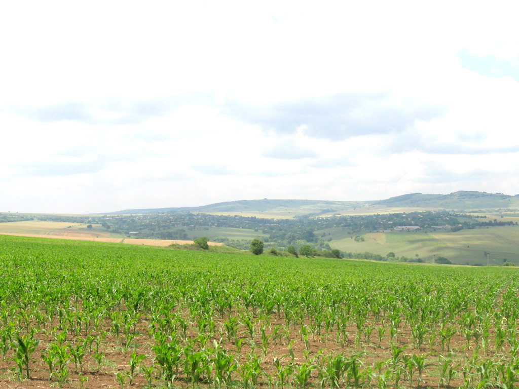 Село Паламарца - поглед от изток, от шосето, свързващо село Гагово с град Попово. Фото: Вл. Стойков - 2007 год.